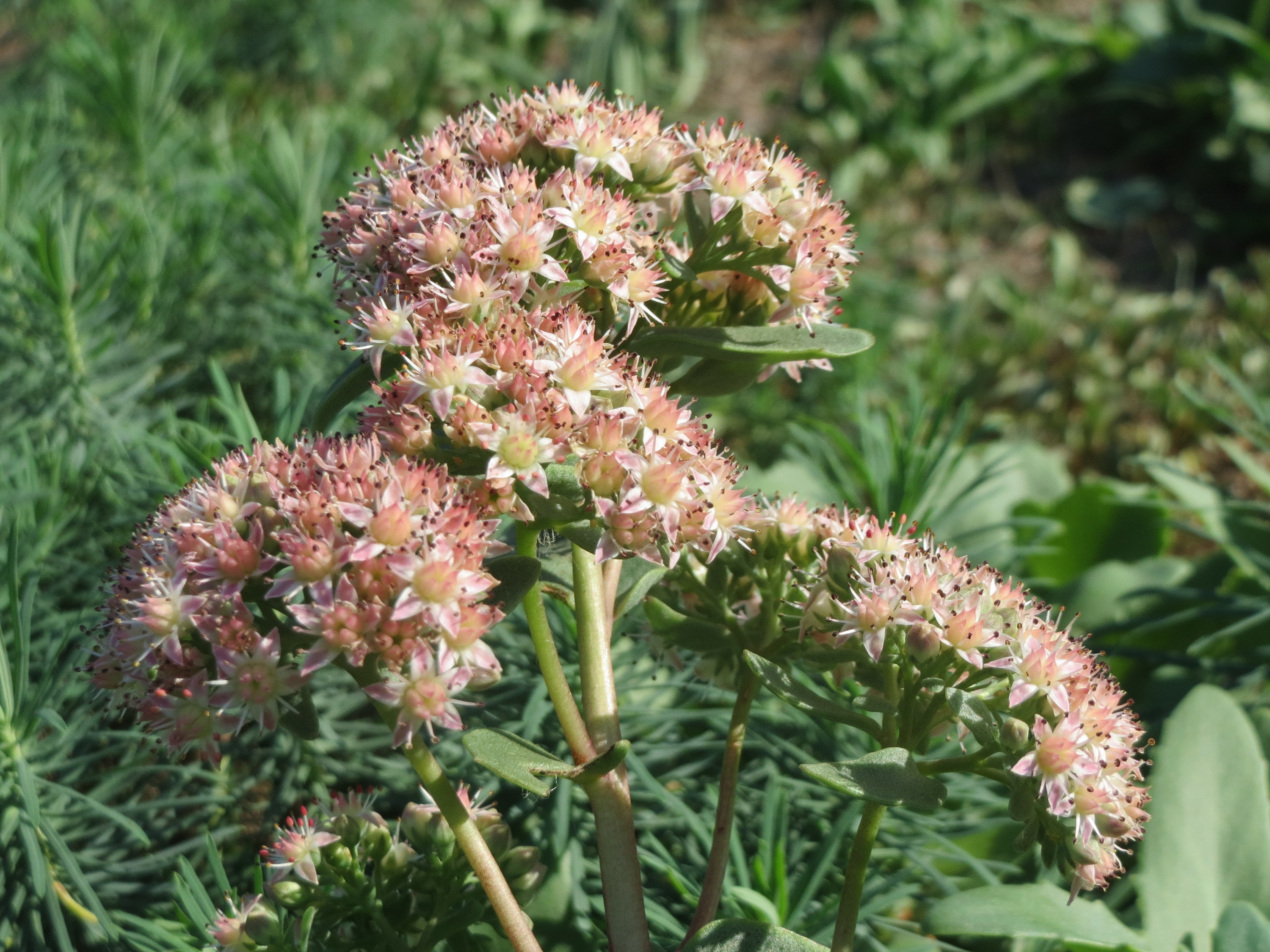 Große Fetthenne (Hylotelephium telephium) bei Hockenheim